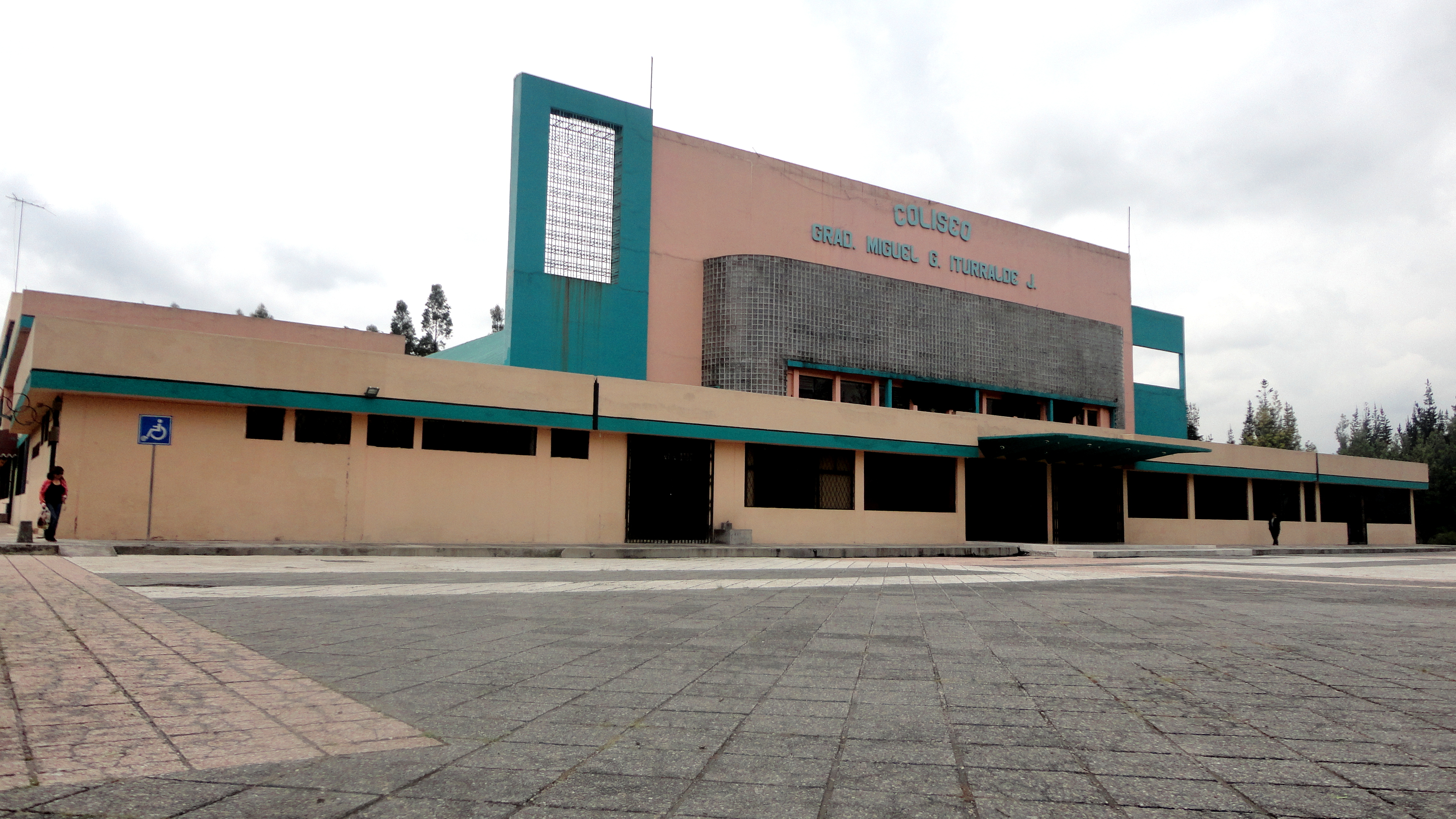 Coliseo de eventos